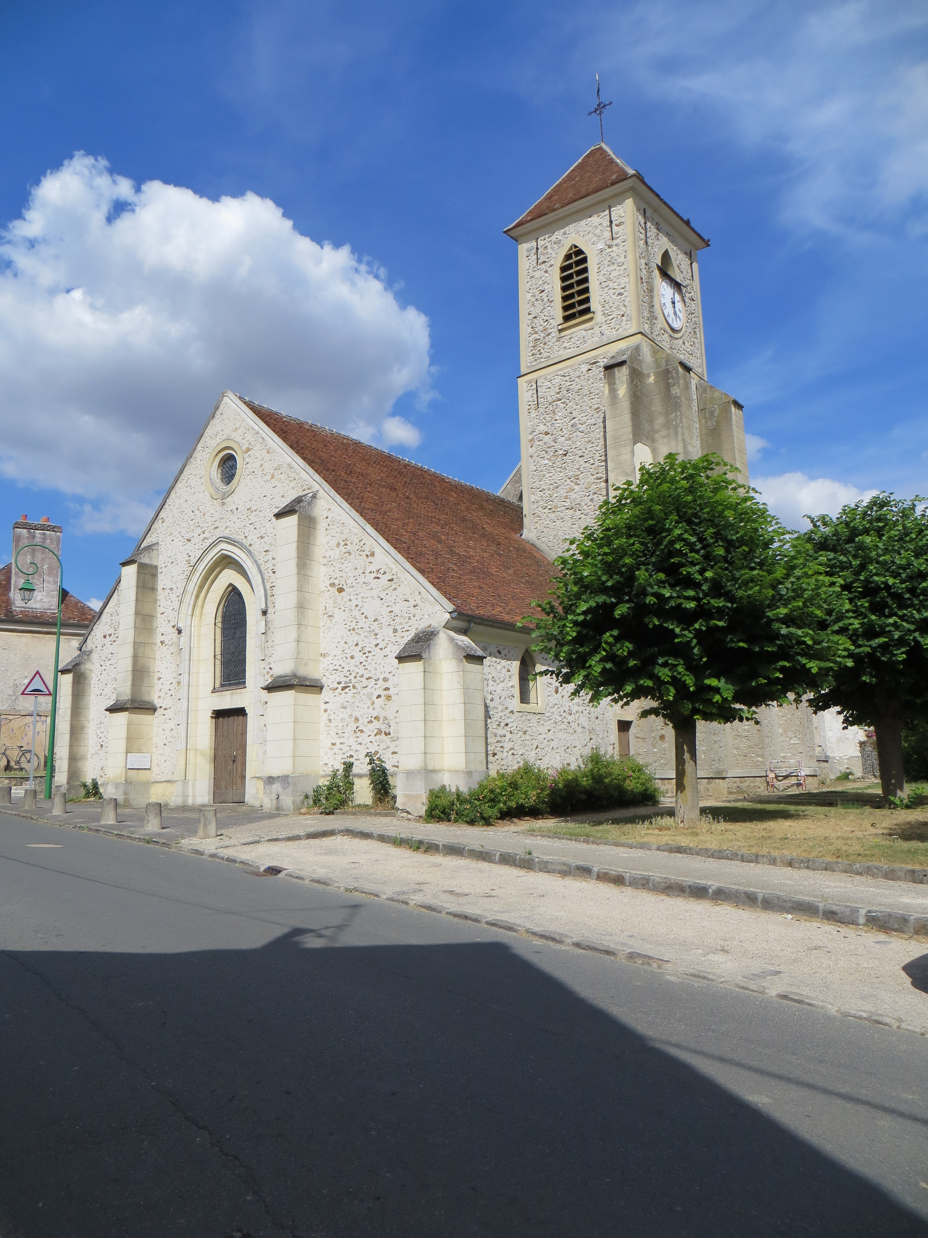 Église de Bouleurs